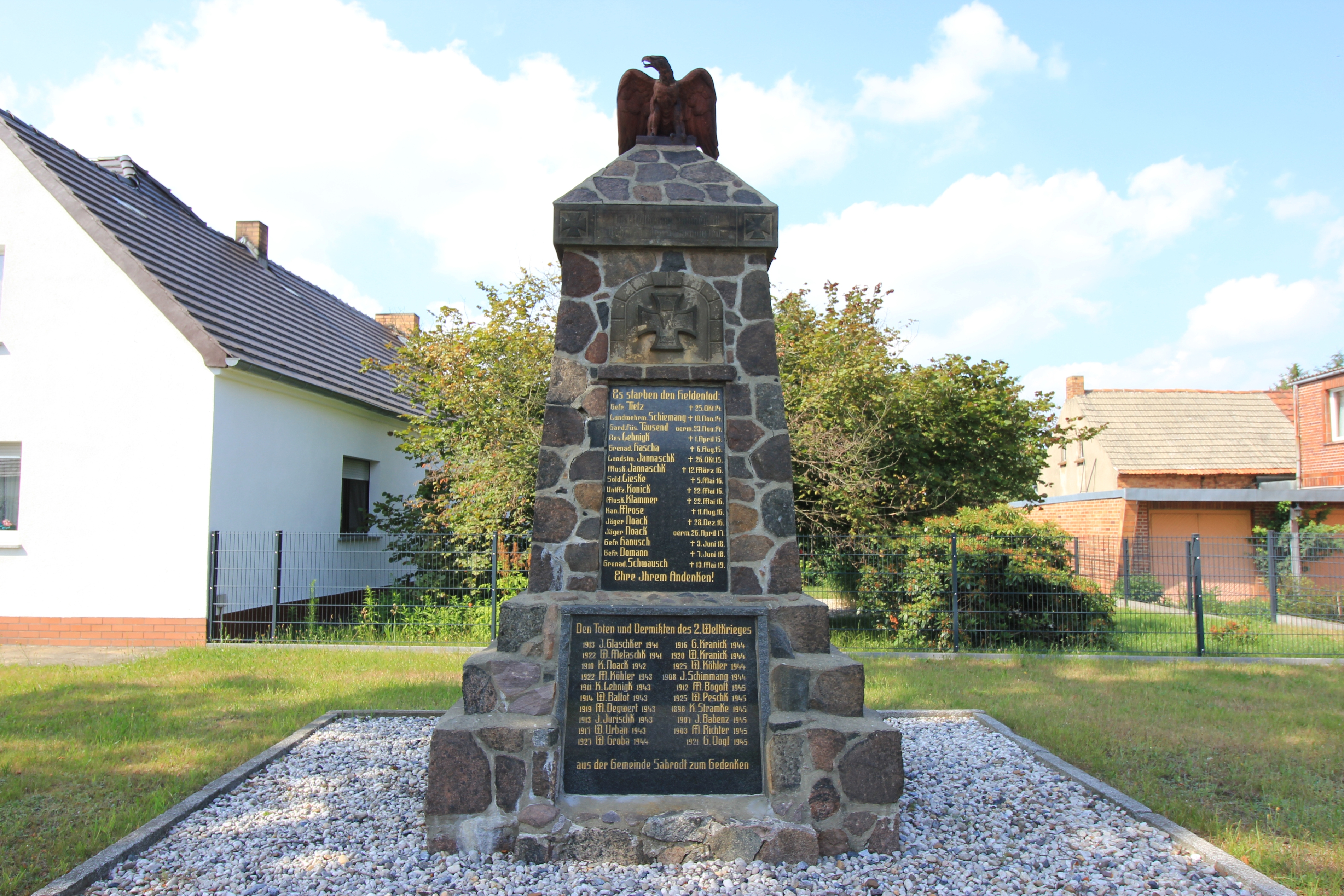 Hornjoserbsce: Pomnik za padnjenych Prěnjeje swětoweje wójny w Zabrodźe.